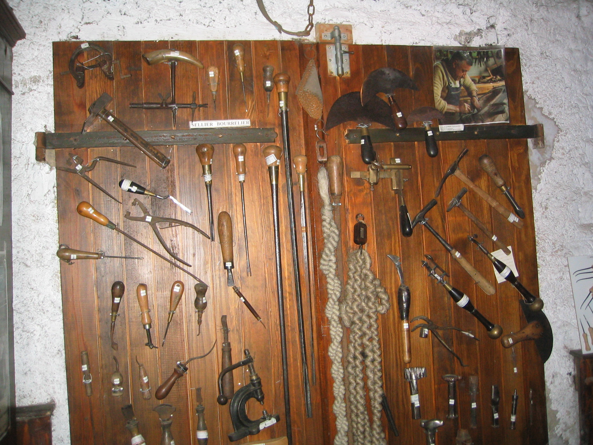 Outils traditionnels du sellier-bourrelier à la ferme-musée de la Soyotte (Saint-Dié-des-Vosges, France)